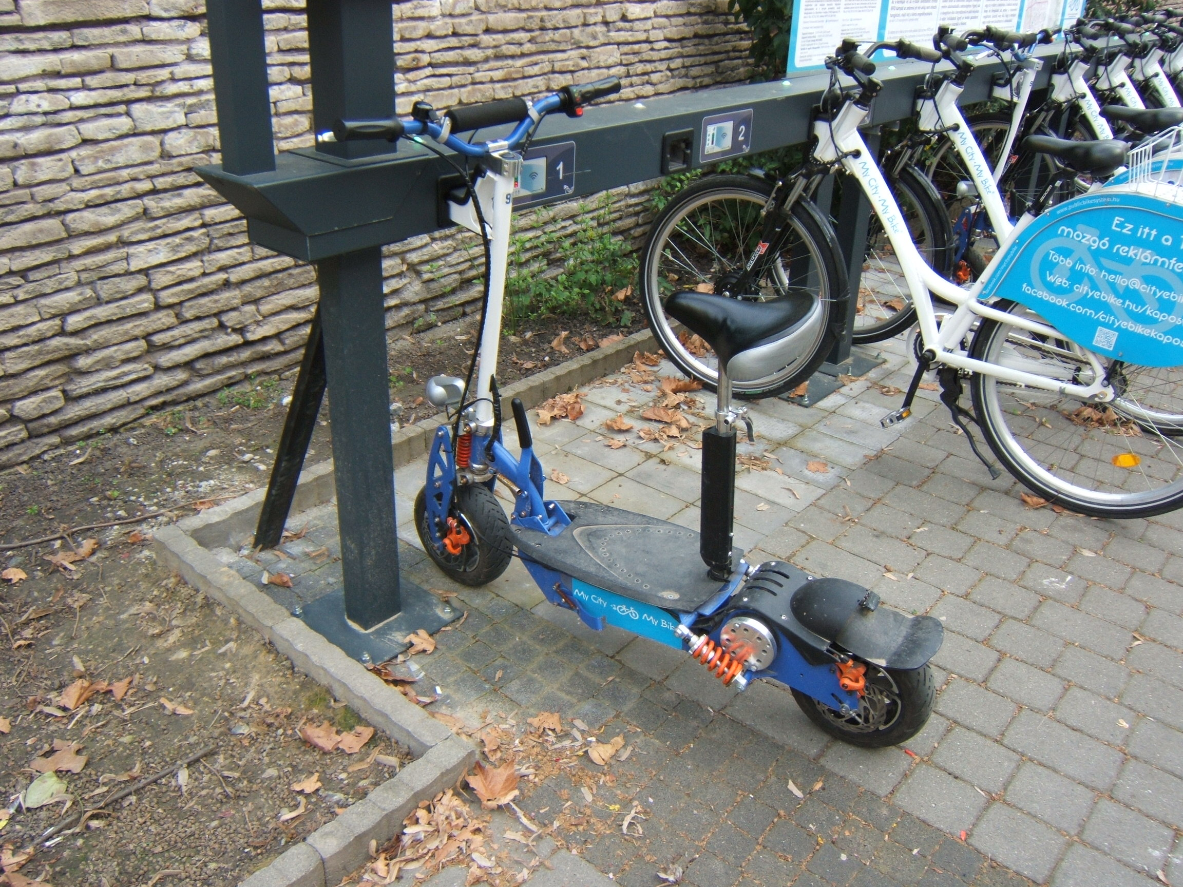 Kölcsönözhető roller a Kaposvári Tekergő rendszerében